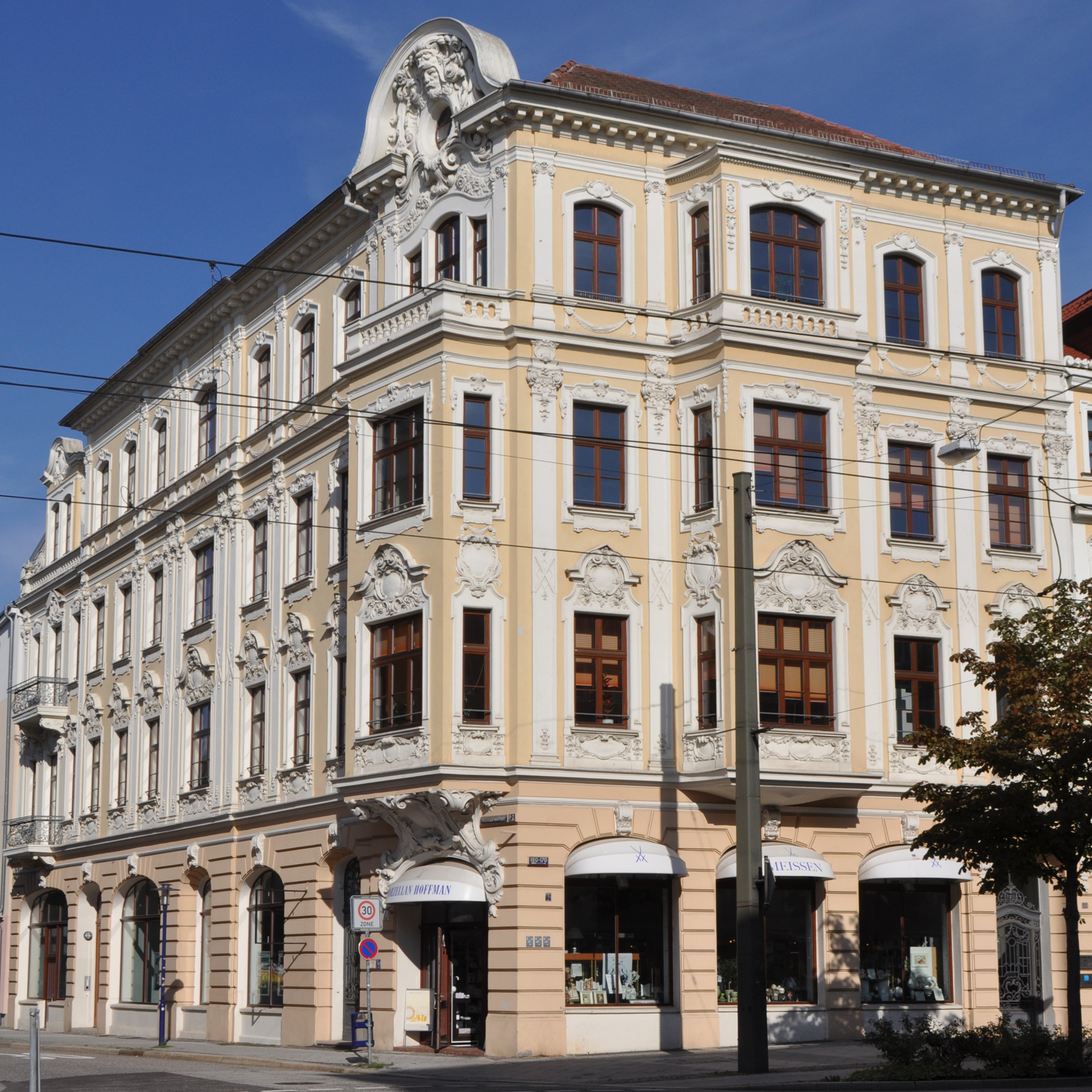 Wohn- und Geschäftshaus Breiter Weg 180 in Magdeburg-Altstadt. This is a photograph of an architectural monument.It is on the list of cultural monuments of Magdeburg